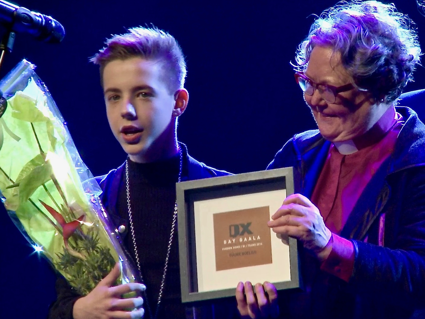 Tuure Boelius voitti Vuode homo -palkinnon QX Gay Gaalassa. Palkintoa jakamassa Helsingin Piispa Irja Askola.